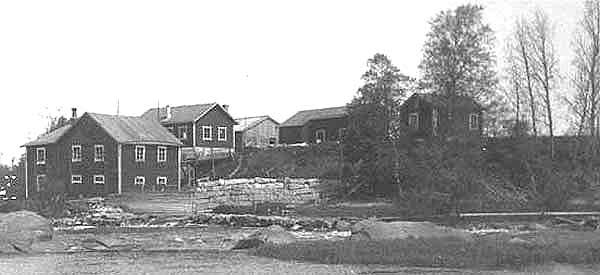 Korsåkers kvarn i Nykarleby, Finland. This photograph is in the public domain in Finland, because either a period of 50 years has elapsed from the year of creation or the photograph was first published before 1966. The §49a of the Finnish copyright law of 2005 specifies that photographs not considered to be "works of art" become public domain 50 years after they were created. The 50 years from creation protection period came into force in 1991. Before that the protection period was 25 years from the year of first publication according to the §16 of the law of protection of photographs of 1961. Material already released to public domain according to the 1961 law remains in public domain, and therefore all photographs (but not photographic works of art) released before 1966 are in the public domain. See Commons:Copyright_rules_by_territory#Finland for details. If you think this picture should be considered a work of art, nominate it for deletion. To uploader: Please provide where the image was first published and who created it.The material with this copyright tag should not be used on the German-language Wikipedia. See Talk page of this template. This work is in the public domain in the United States because it meets three requirements: it was first published outside the United States (and not published in the U.S. within 30 days), it was first published before 1 March 1989 without copyright notice or before 1964 without copyright renewal or before the source country established copyright relations with the United States, it was in the public domain in its home country on the URAA date (January 1, 1996 for most countries). For background information, see the explanations on Non-U.S. copyrights. Note: This tag should not be used for sound recordings.